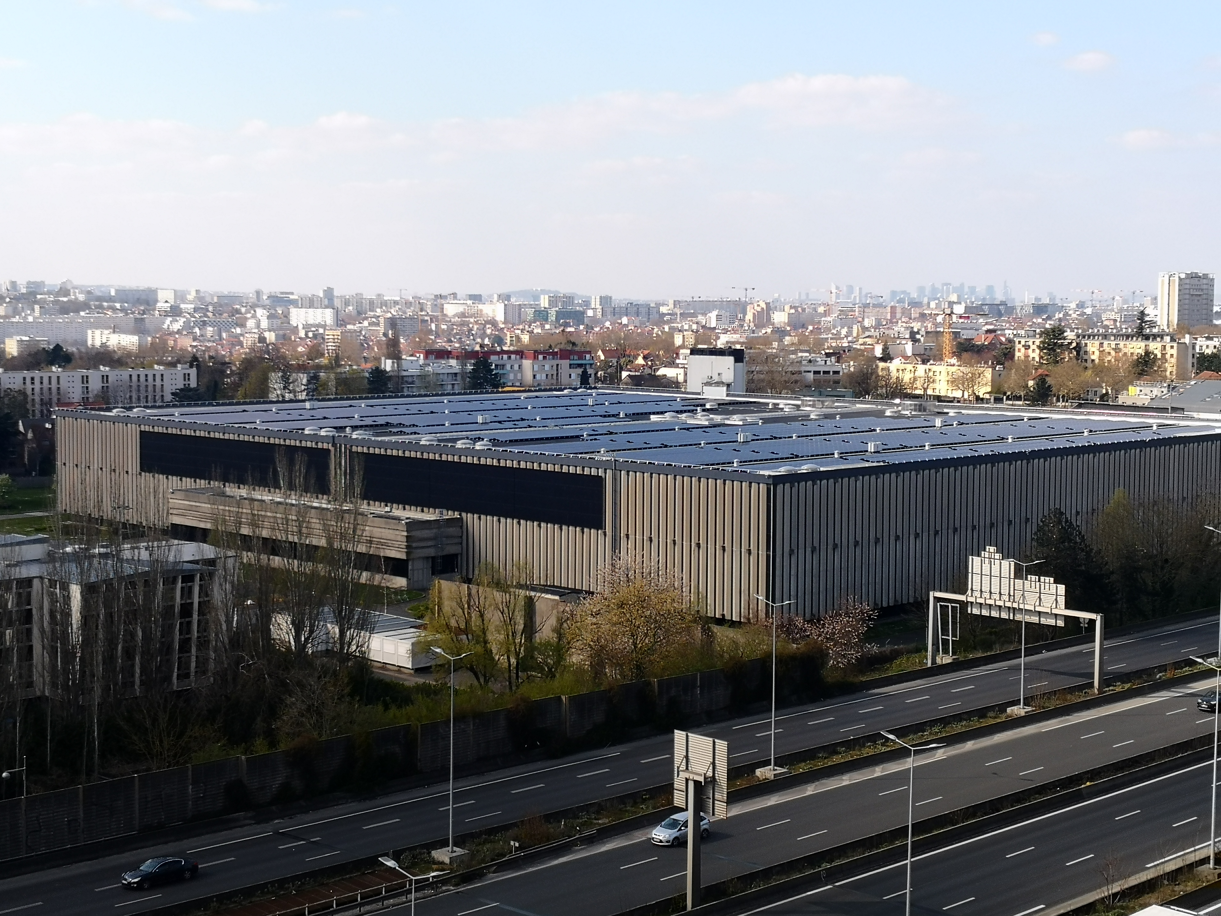 Réservoir Eau de Paris de L'Haÿ Les Roses (94240)